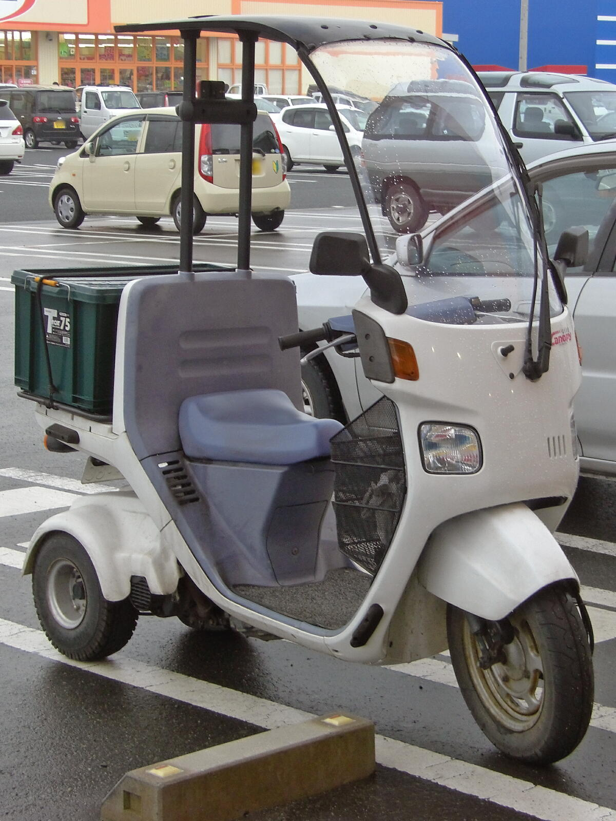 ホンダ・ジャイロキャノピー